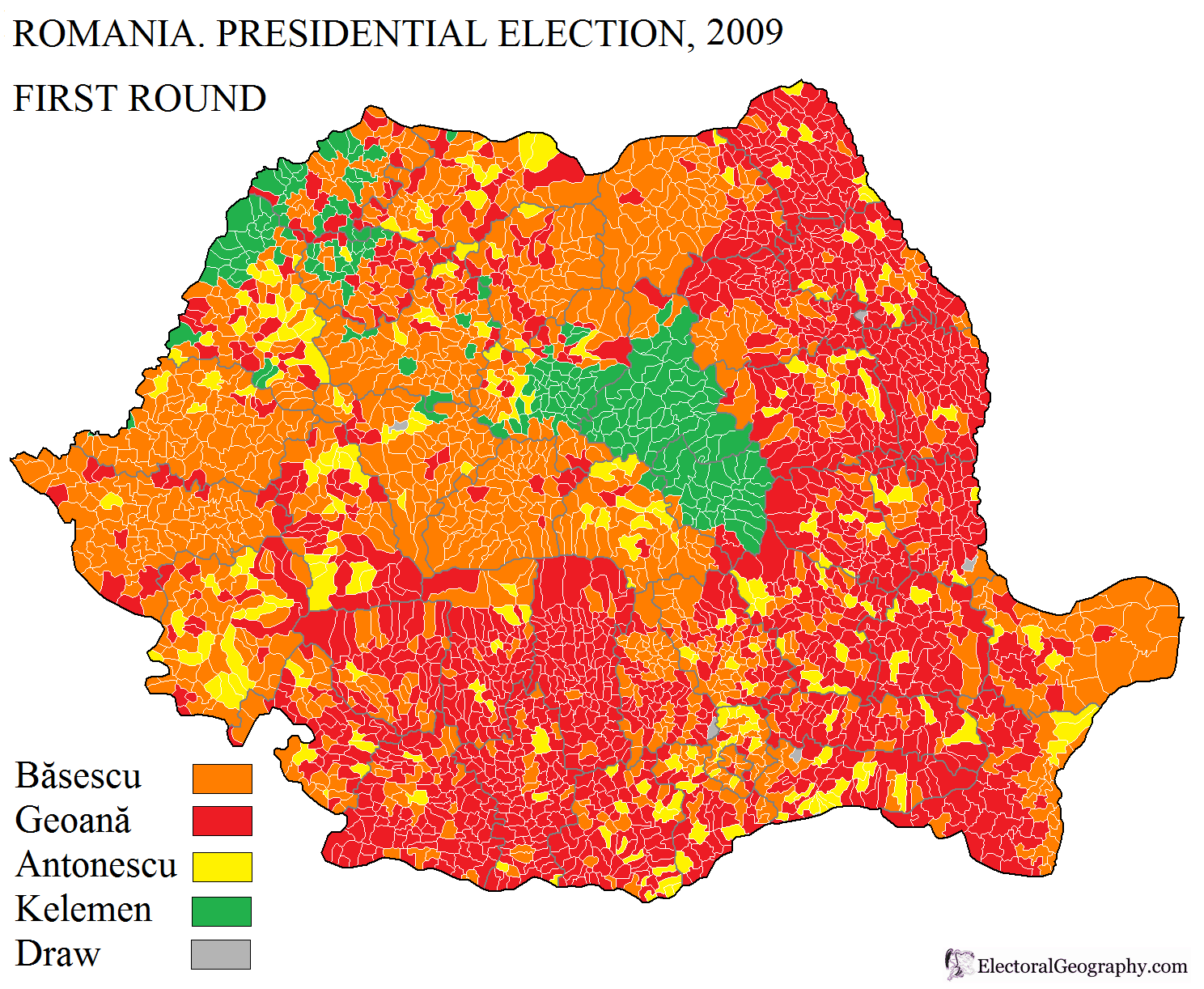 Показан первый тур выборов президента Румынии по коммунам.